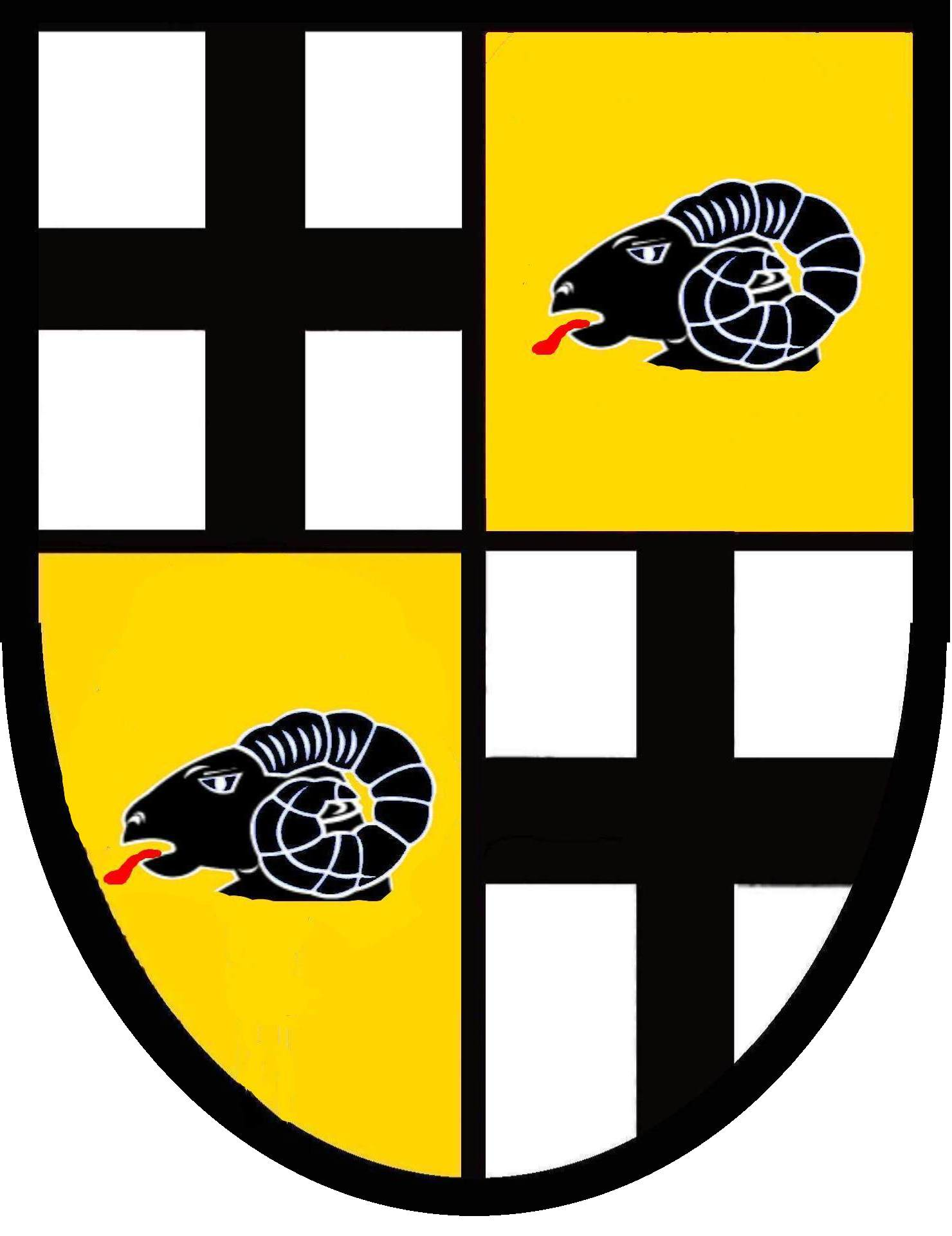 Wappen Amand von Buseck (1685-1756) Weihbischof in Fulda 1728-1752, Fürstabt von Fulda 1737-1752, Fürstbischof von Fuldas 1752-1756